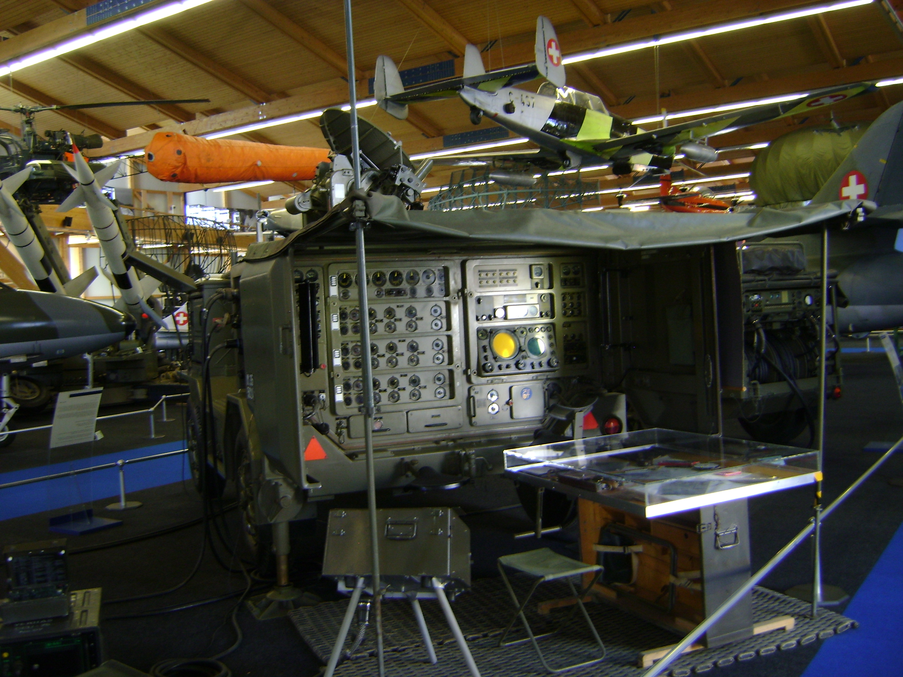 Superfledermaus